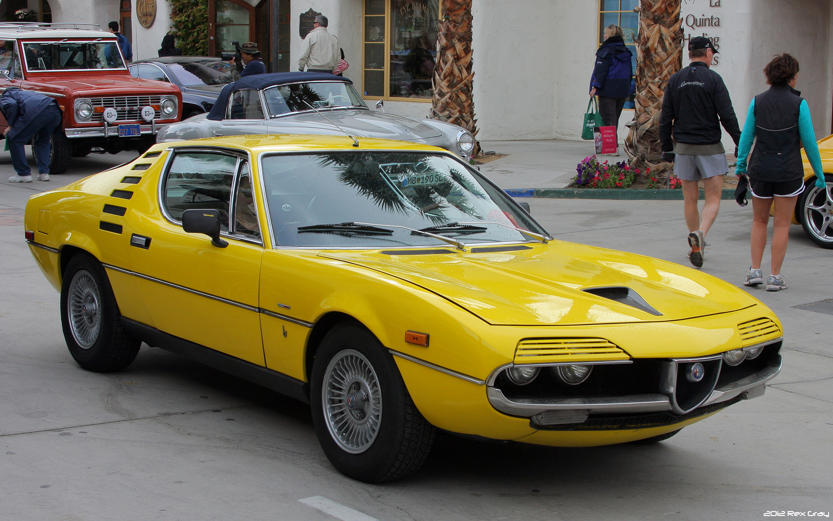 1974 Alfa Romeo Montrea